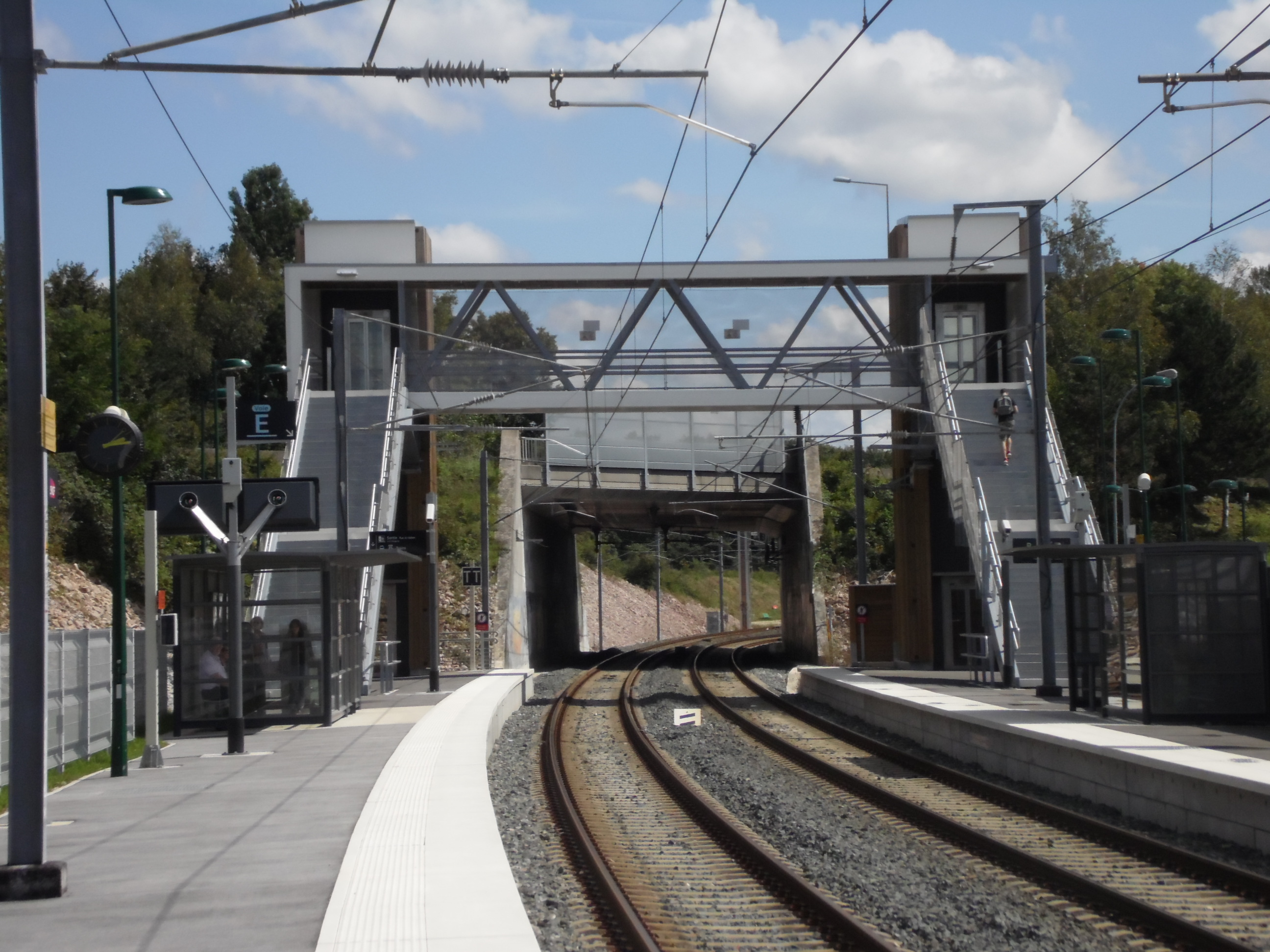 La gare d'École Valentin, le 30 août 2014.